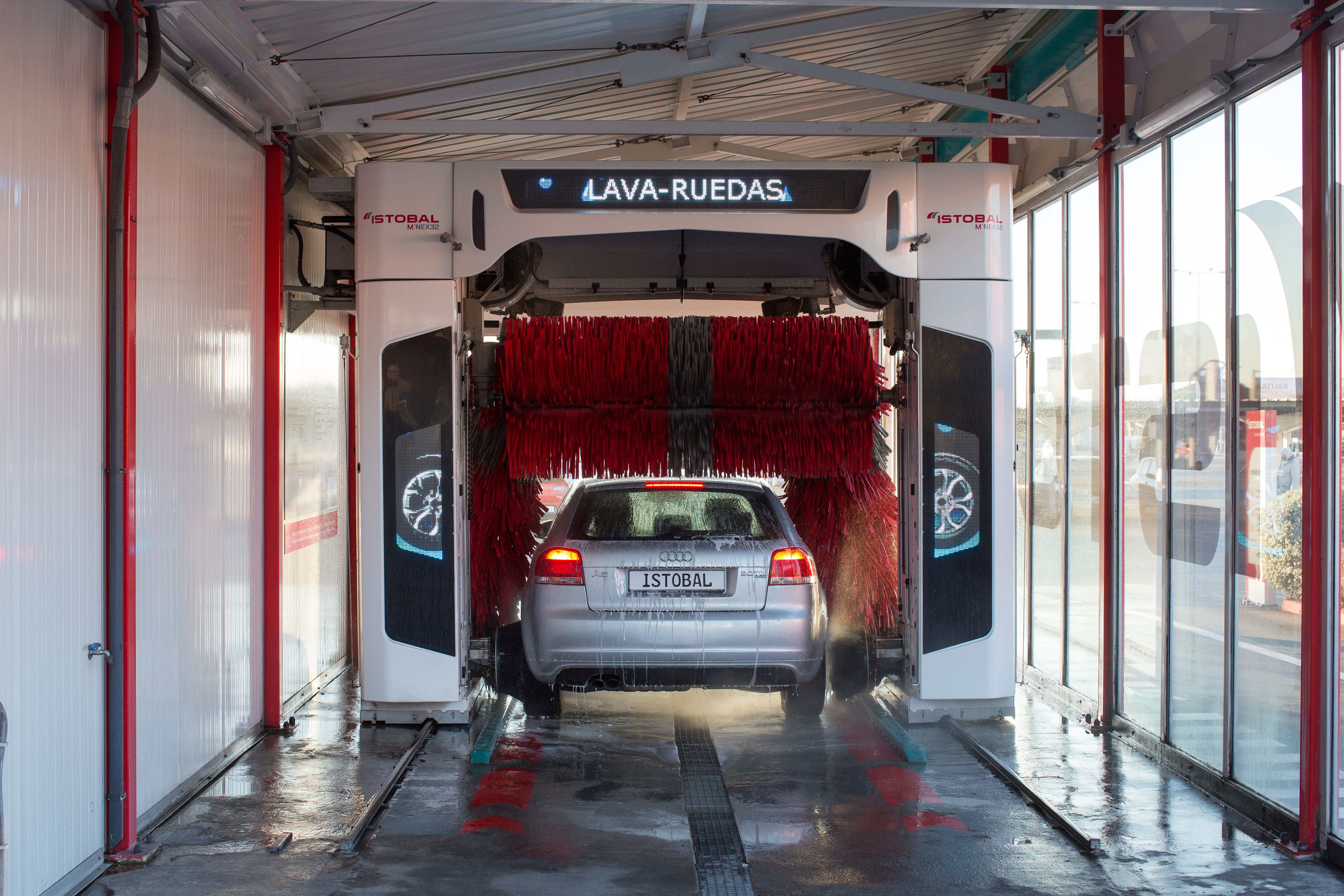 ISTOBAL M'NEX32 en el Showroom de ISTOBAL en Alzira (Valencia, España)